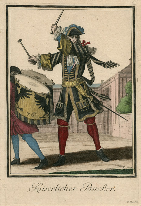 Neu-eröffnete Welt-Galleria. ..., Nürnberg 1703. 25. Kaiserlicher Paucker.